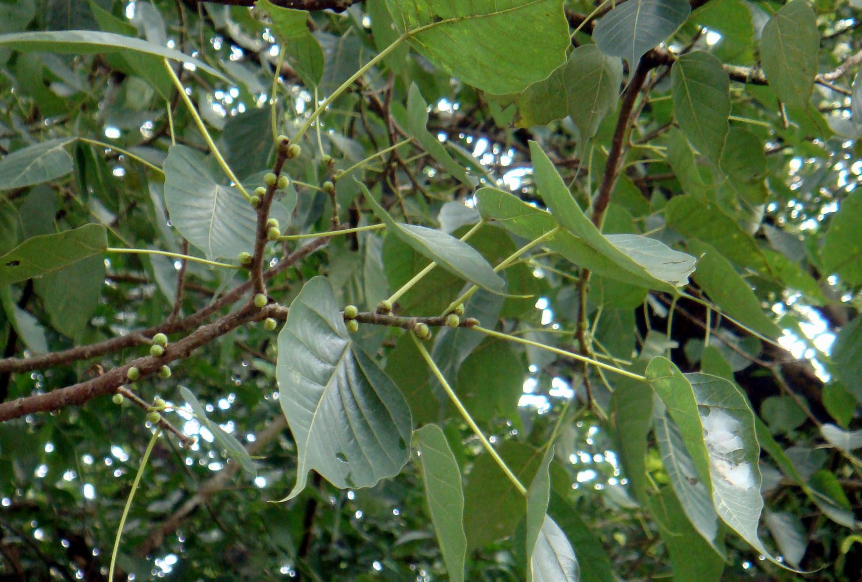 ആൽമരം-കായ്